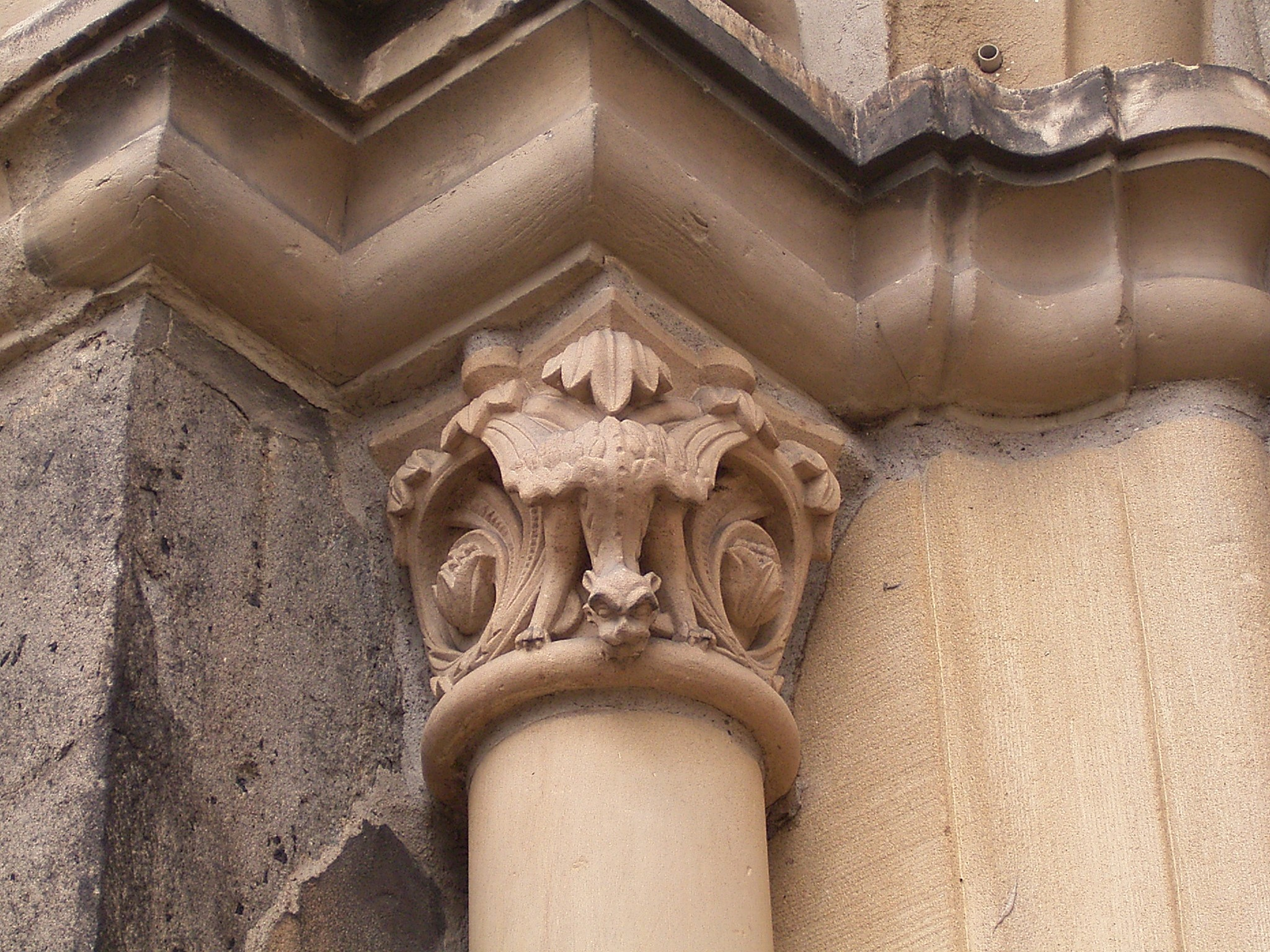 Sankt Mariä Himmelfahrt in Solingen-Gräfrath